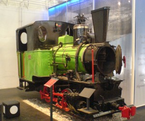 Zobel Waldbahndampflokomotive. Lok "Hans" im Südbahnmuseum am Bahnhof Mürzzuschlag.